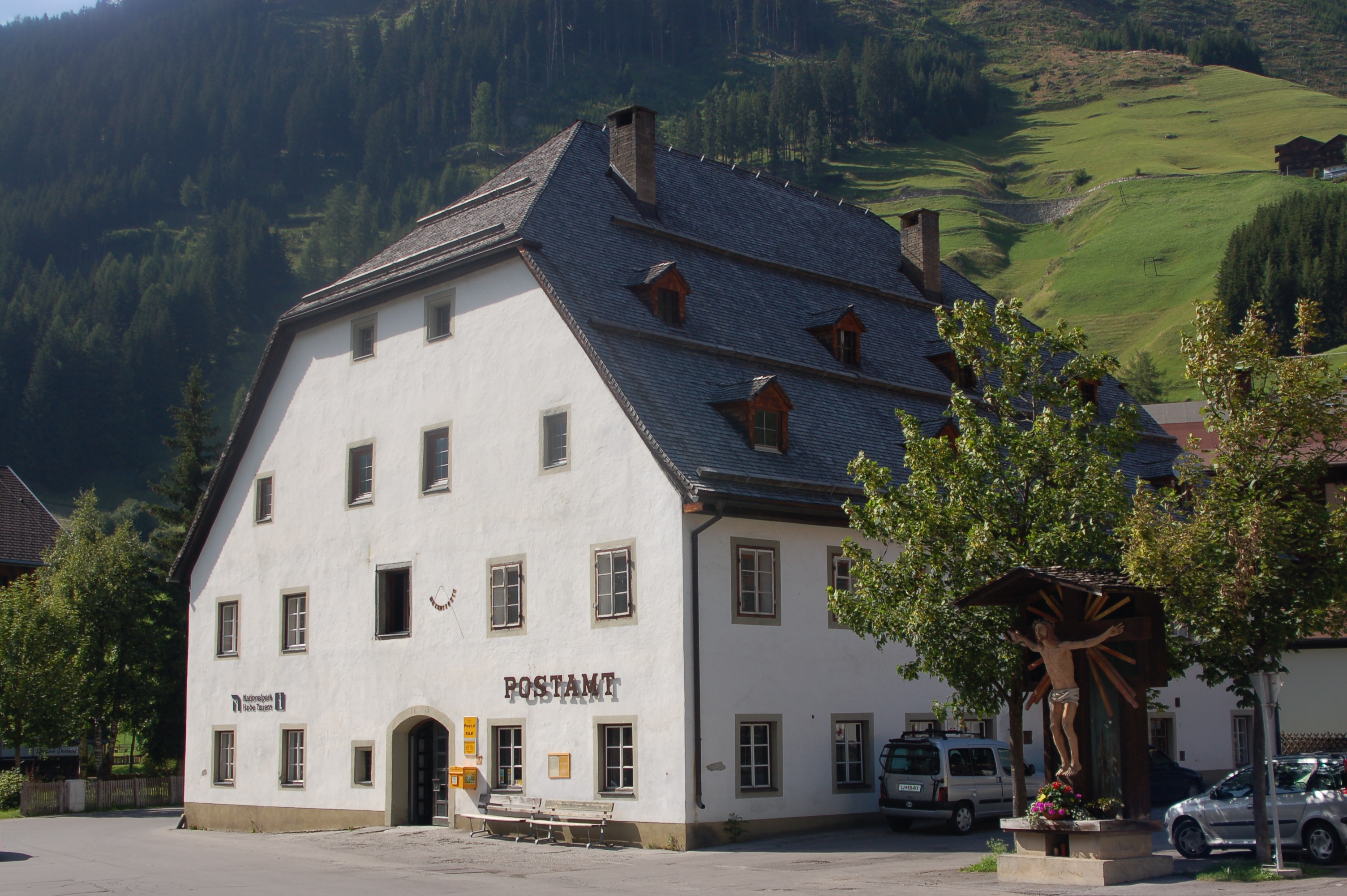 Knappenhaus in Sankt Jakob in Defereggen